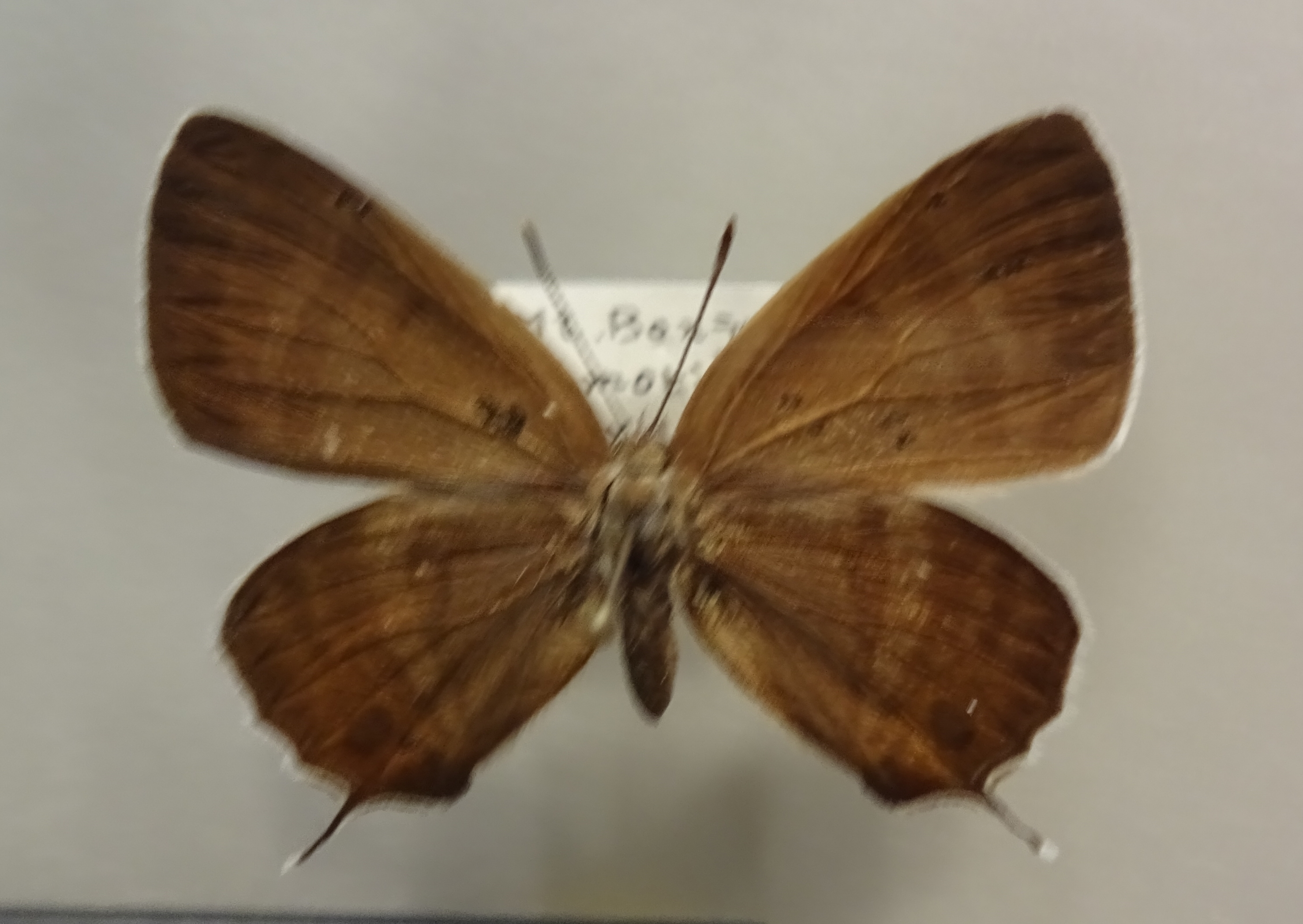 フジミドリシジミ